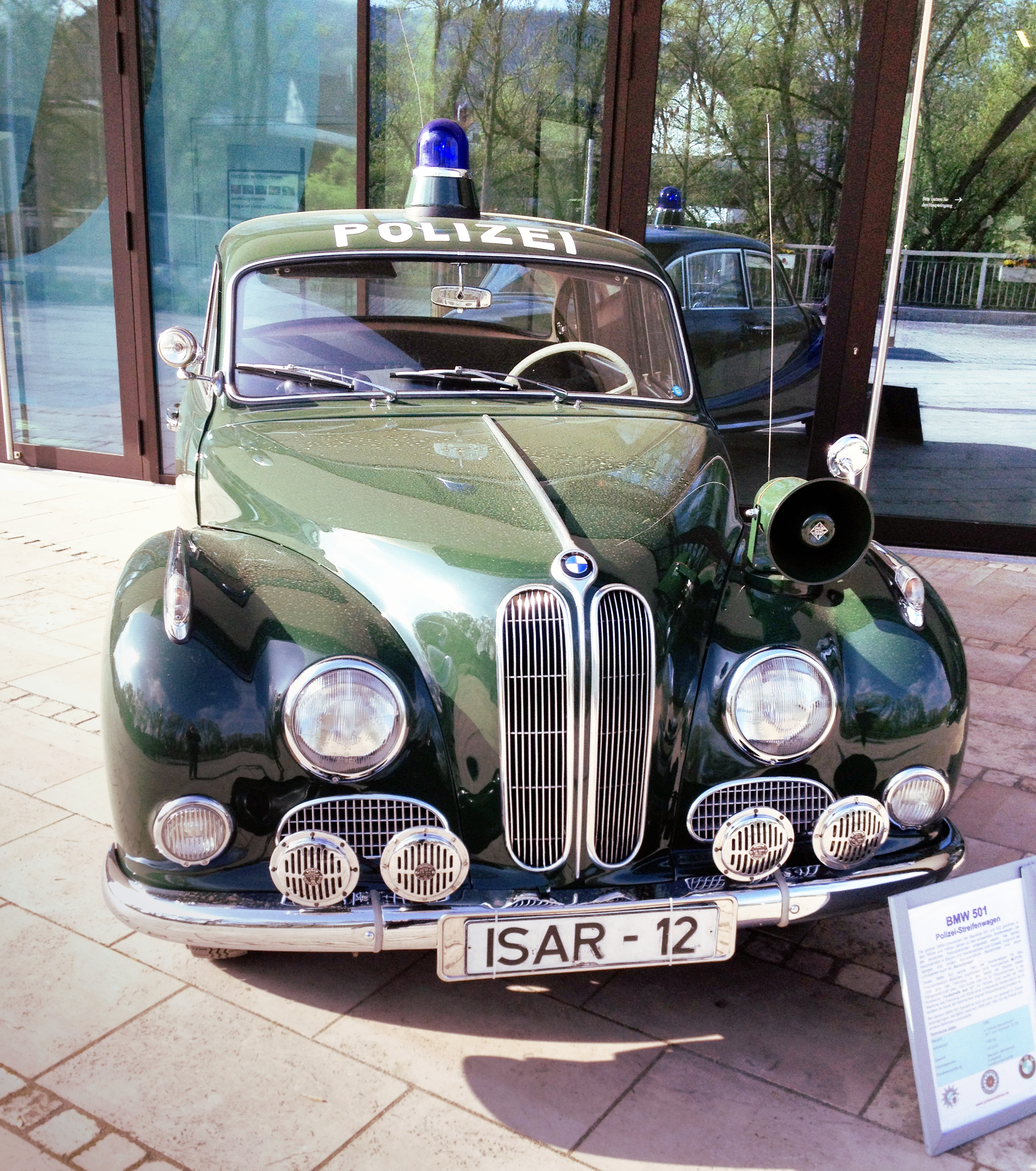 Bildinhalt: Historisches Polizeiauto BMW 501 Aufnahmeort: Marburg, Deutschland